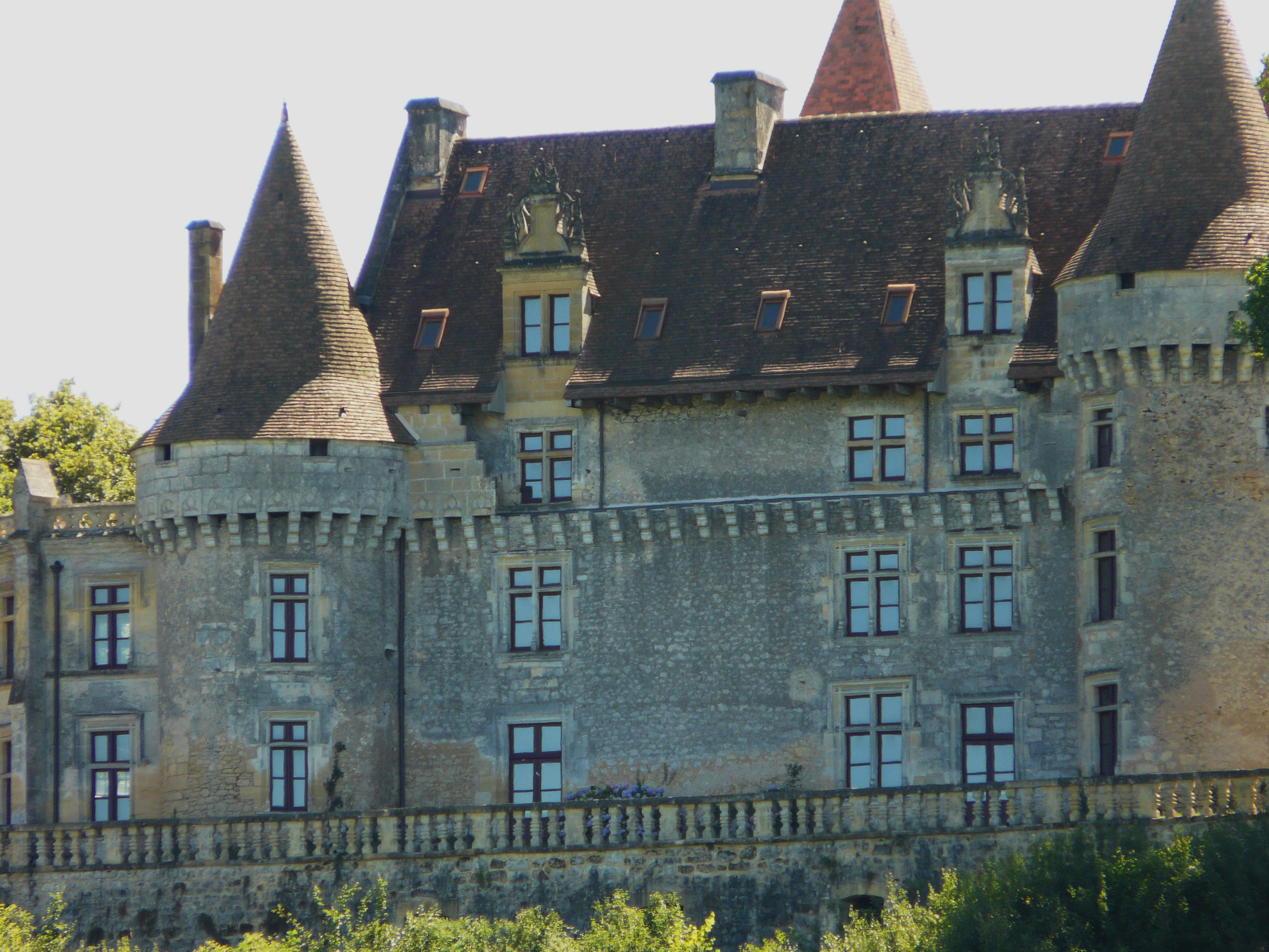 La façade nord-est du château de Marzac, Tursac, Dordogne, France.